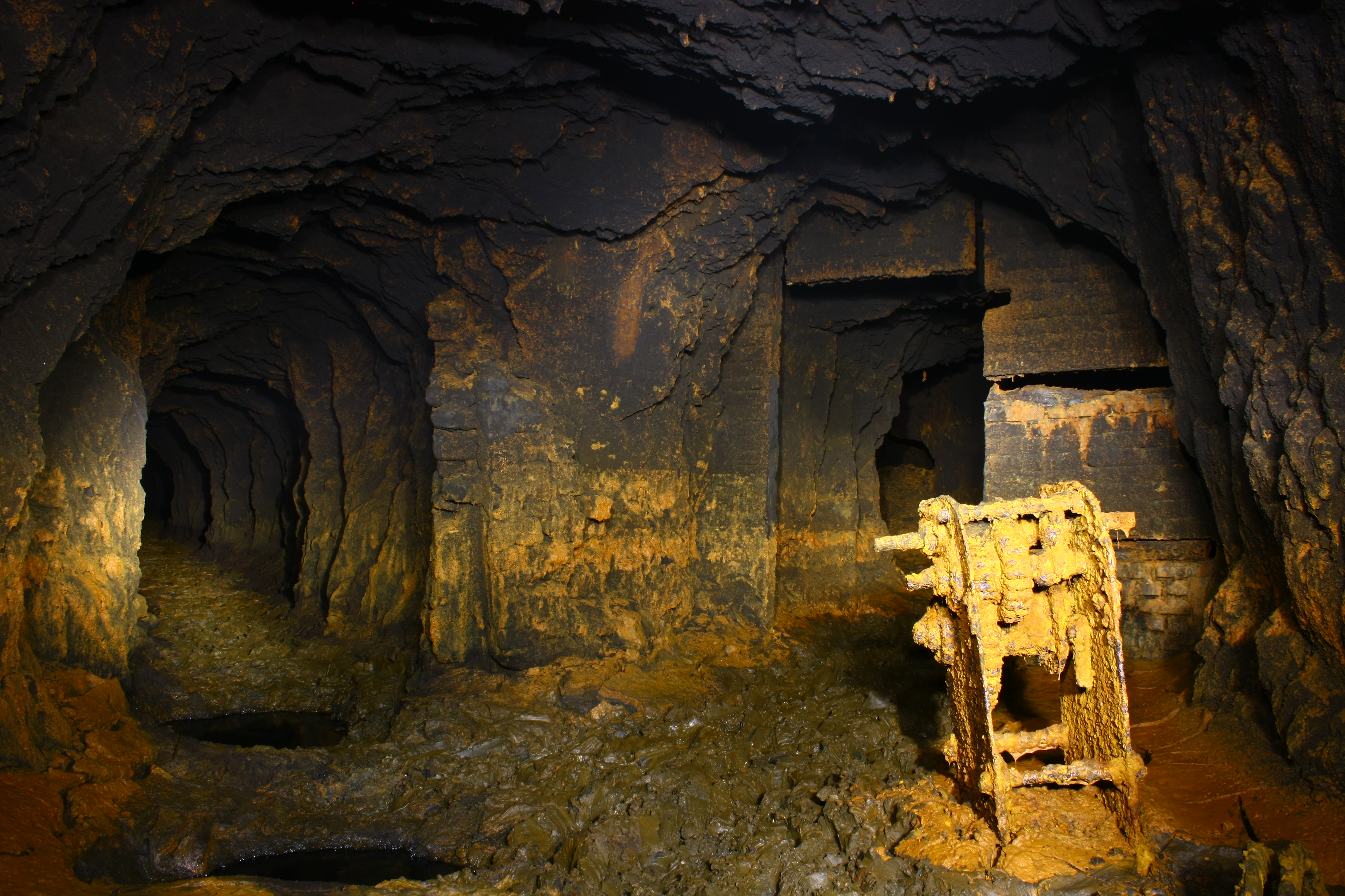 Streckenkreuz Füllort Apfelbaum